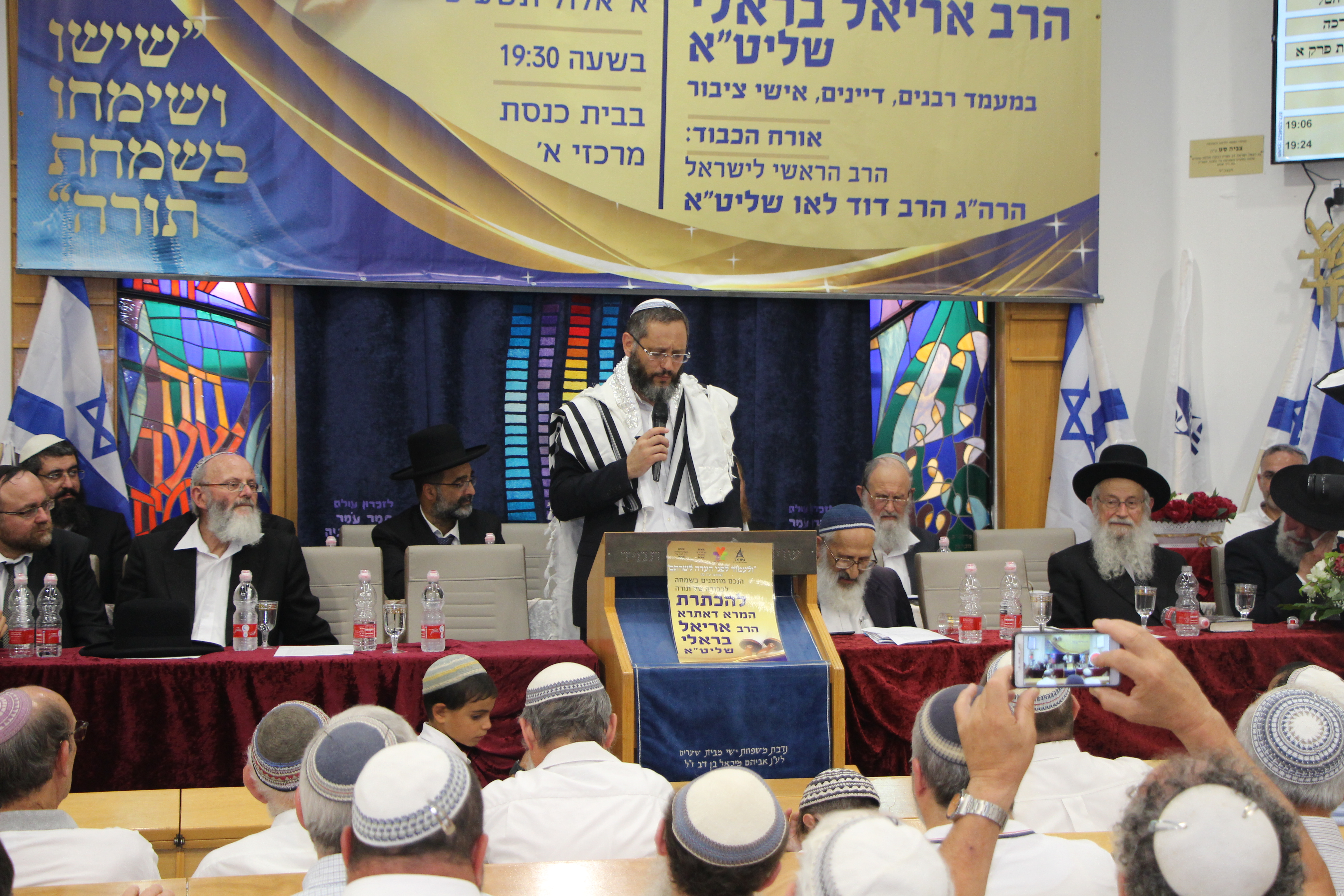 מעמד הכתרת הרב בראלי לרבנות הישוב בית אל